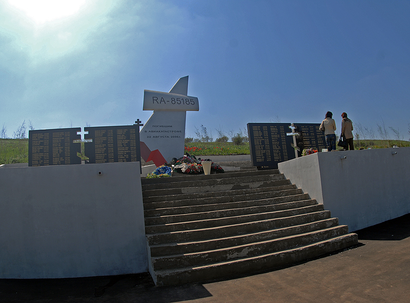 Monument TU-154